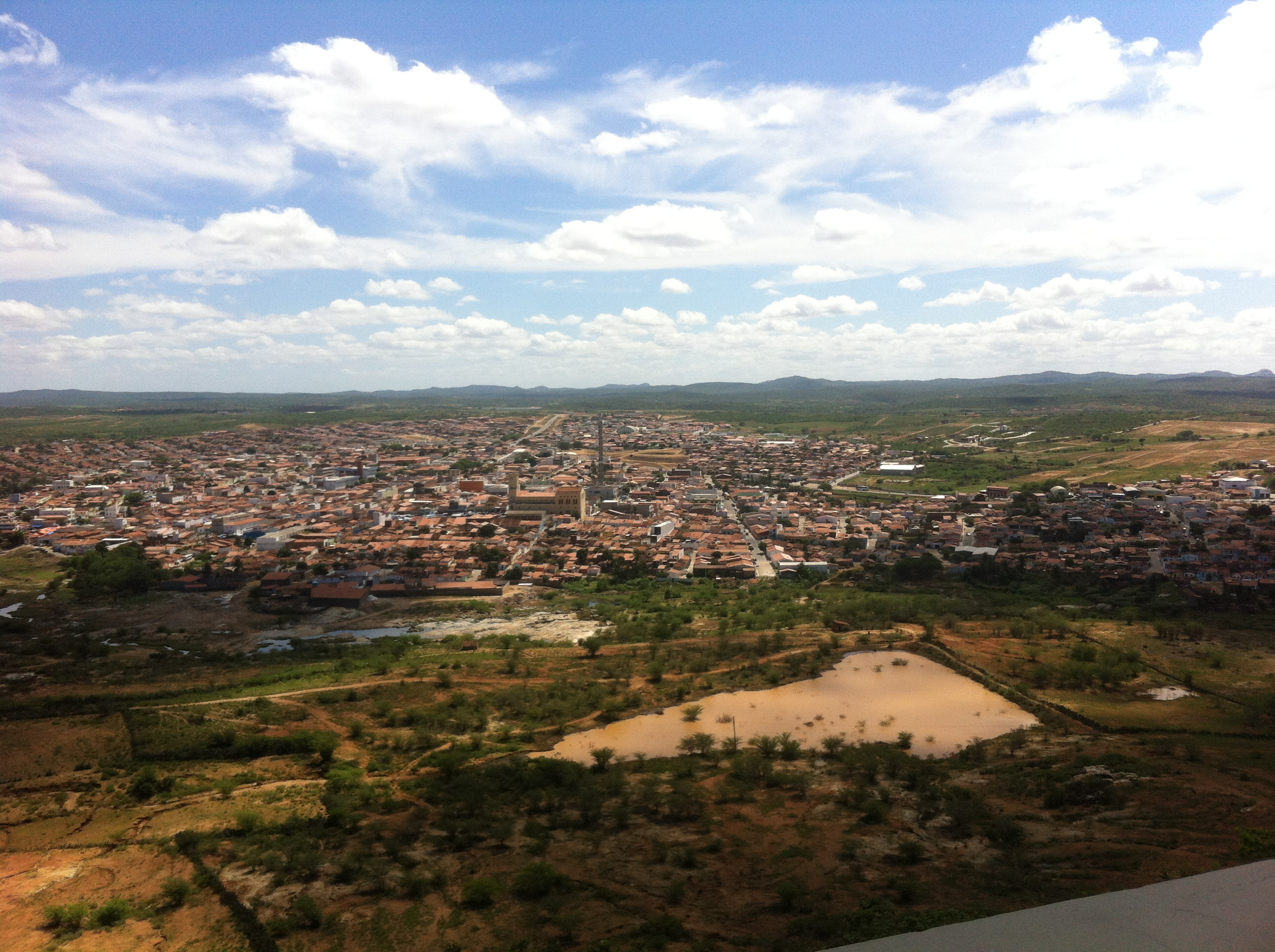 vista da cidade de Santa Cruz, Rio Grande do Norte do Santuário de Santa Rita